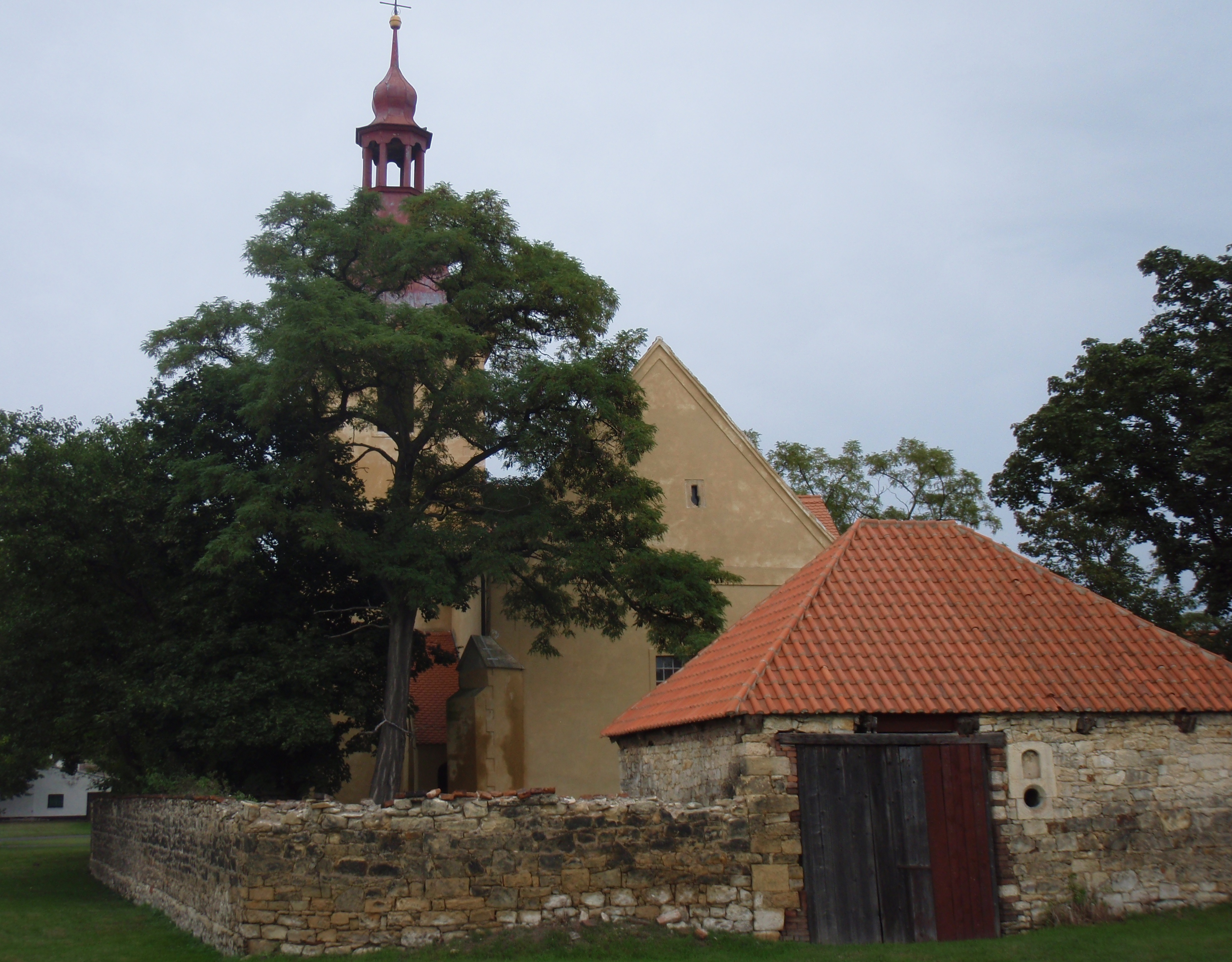 Kostel sv. Martina (Břvany), Břvany